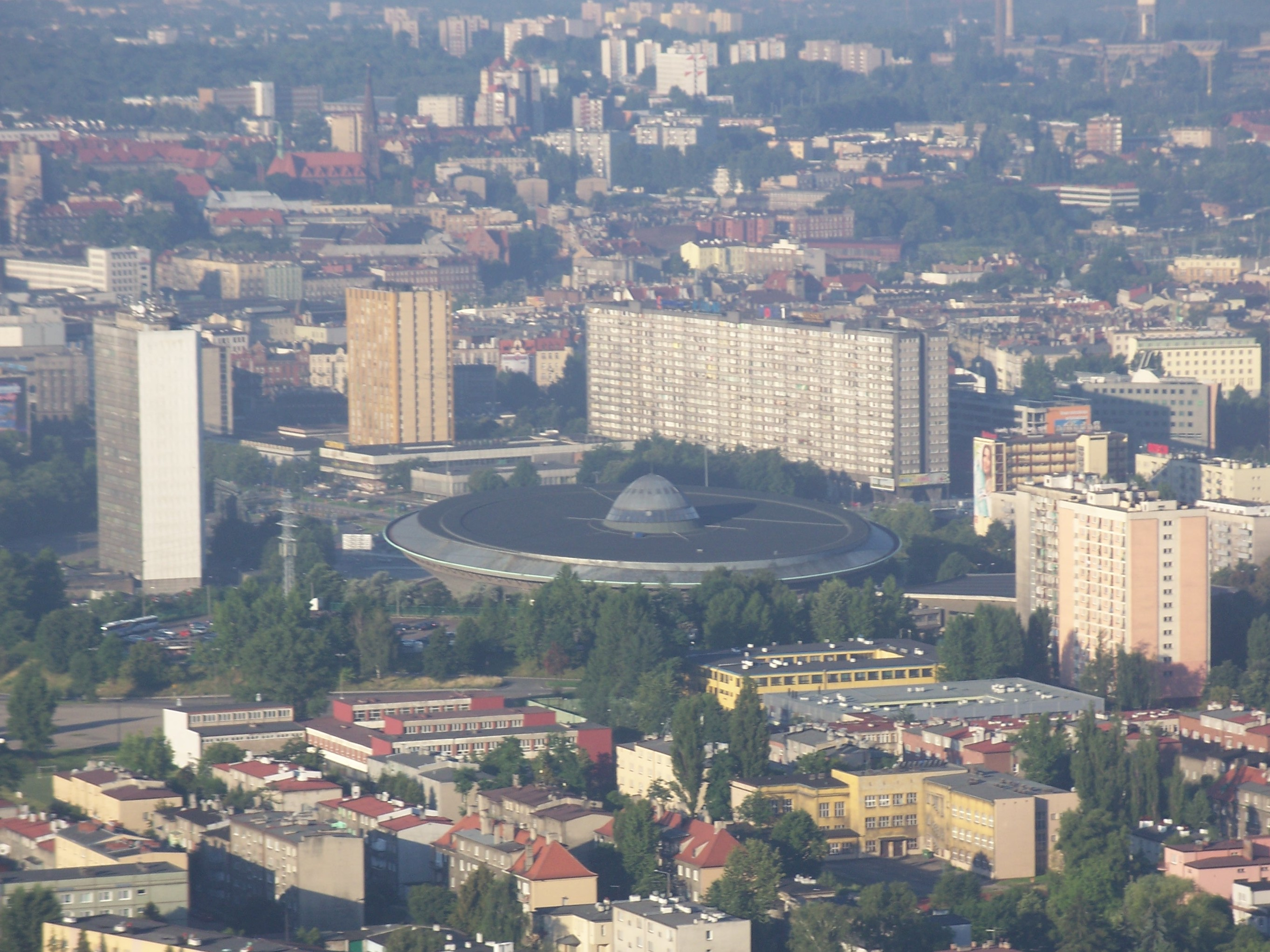 Katowicki Spodek widziany z powietrza